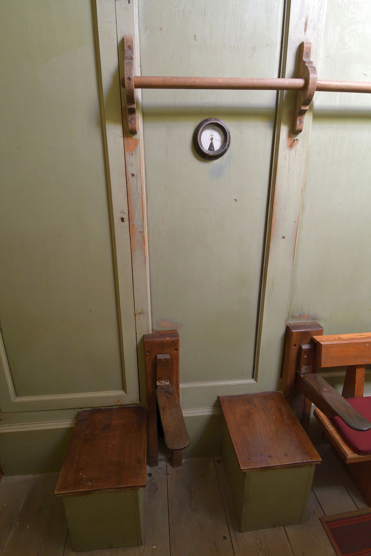 podwójny nożny mechanizm pompujący ze wskaźnikiem poziomu powietrza